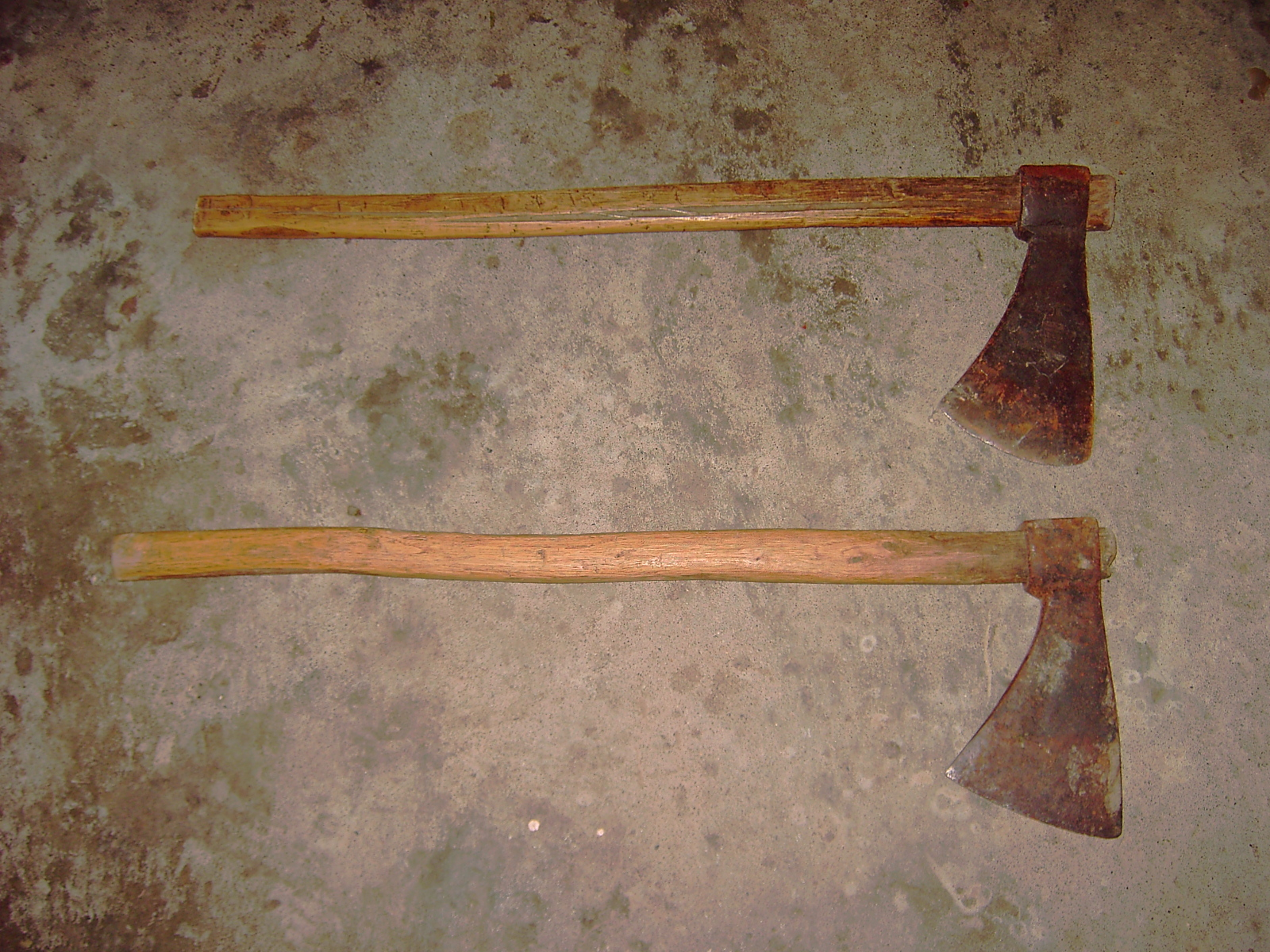 Hachas altaragonesas.